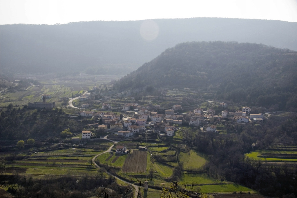 Panoramic view of Slovenian village of Hrastovlje